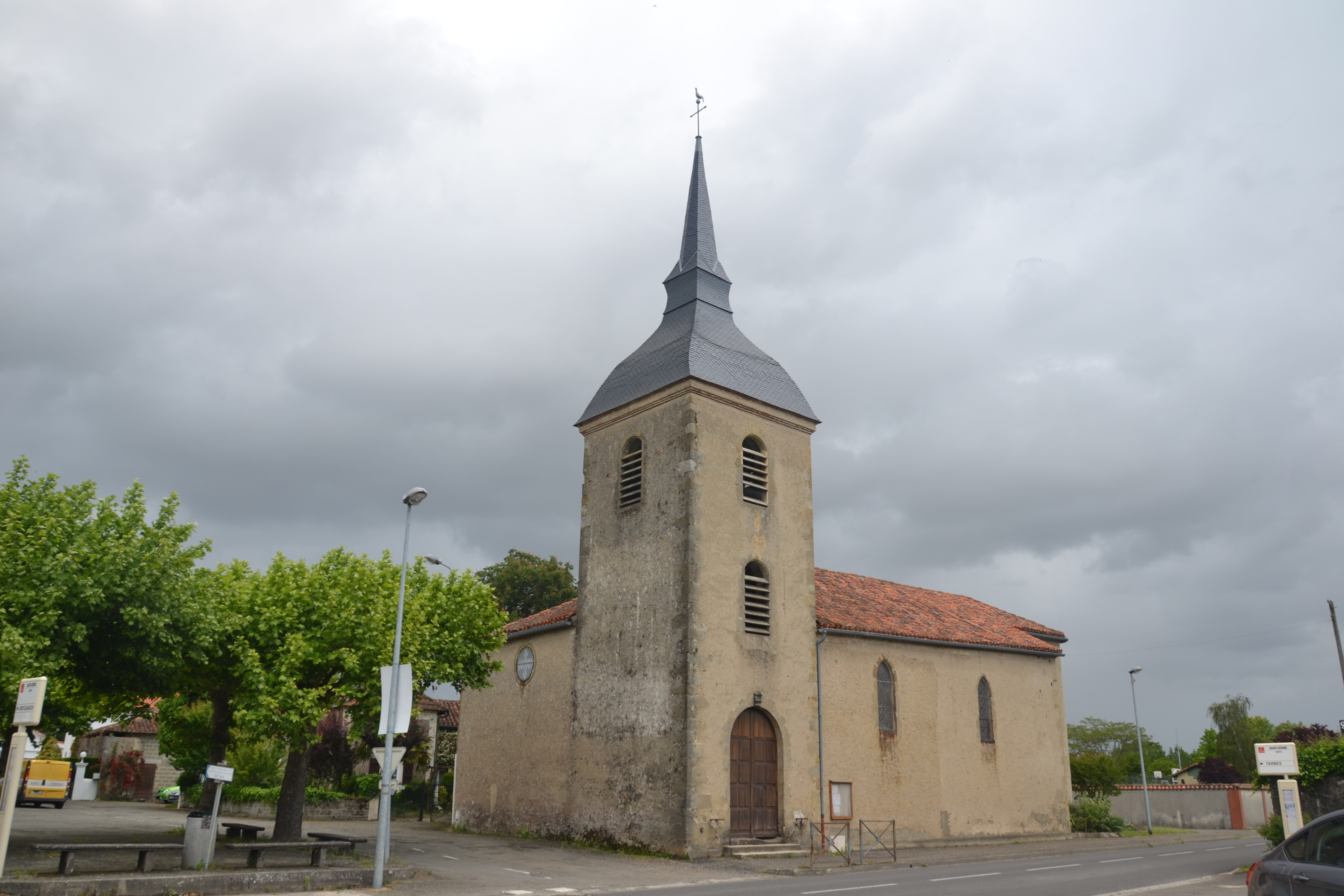 église de Saint-Germé